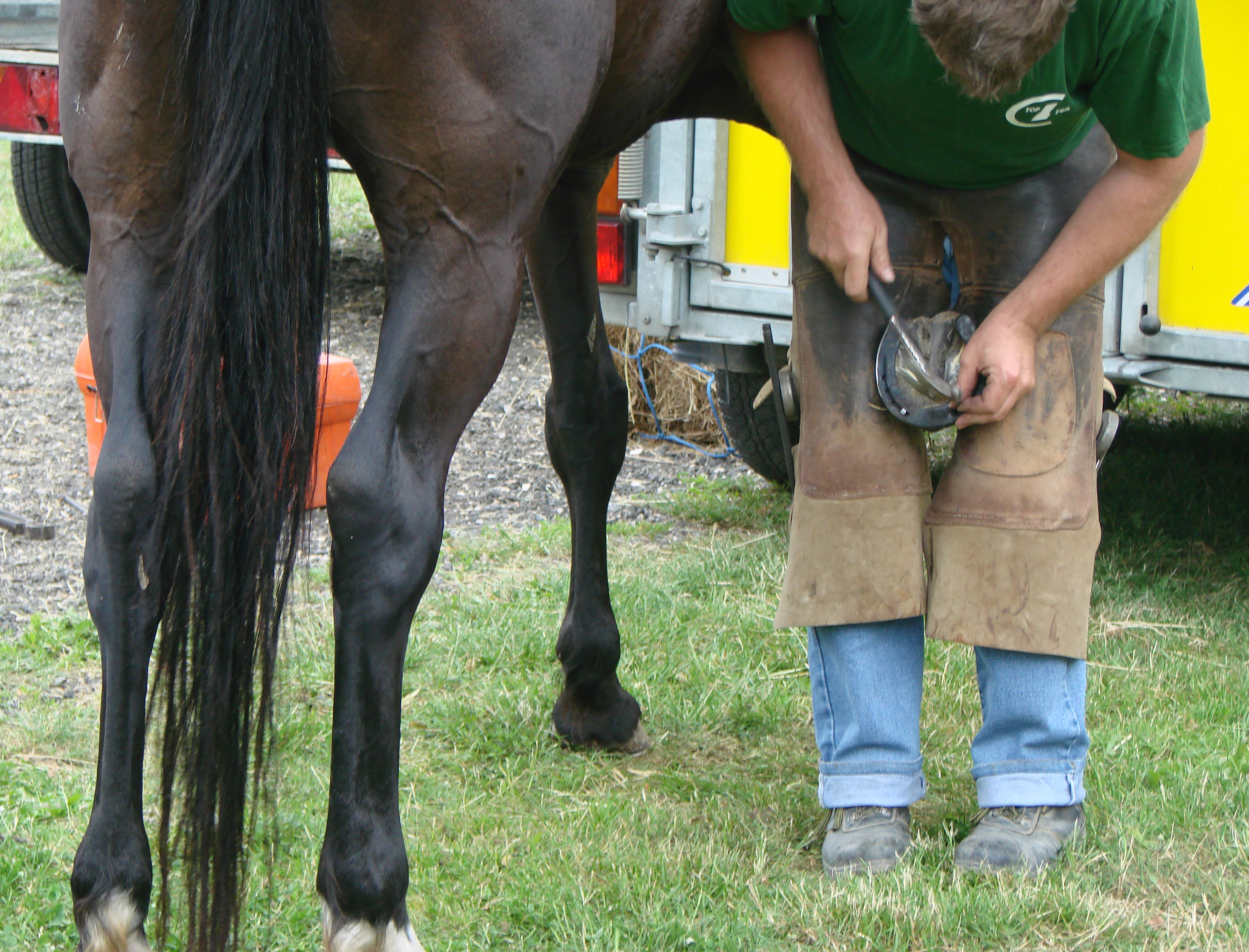 Les clous sont posés en partant du milieu et en procédant alternativement de chaque côté.